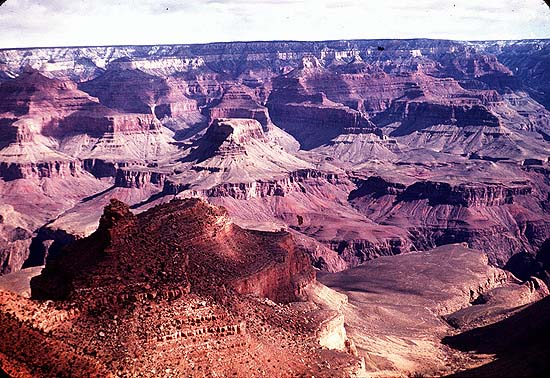 Grand Canyon, vanaf openbare bron